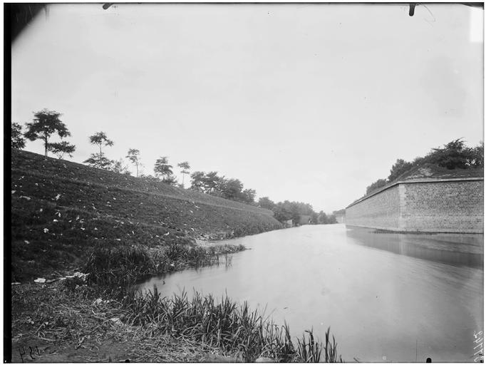 Vue des fortifications